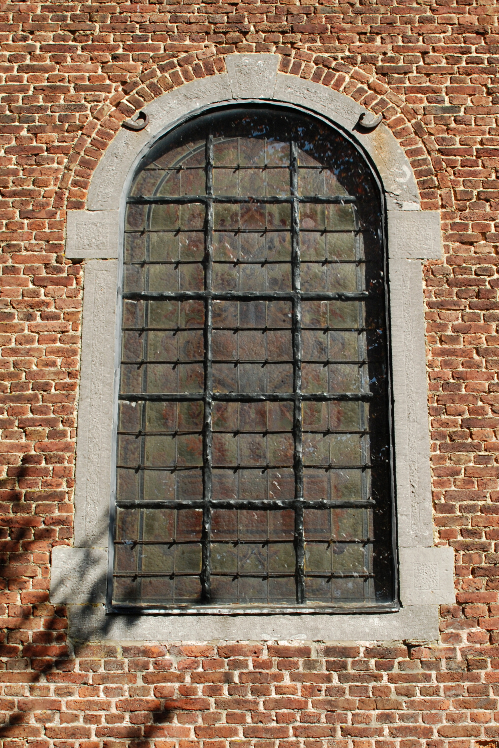 Belgique - Brabant wallon - Mont-Saint-Guibert - Église Saint-Pierre de Corbais